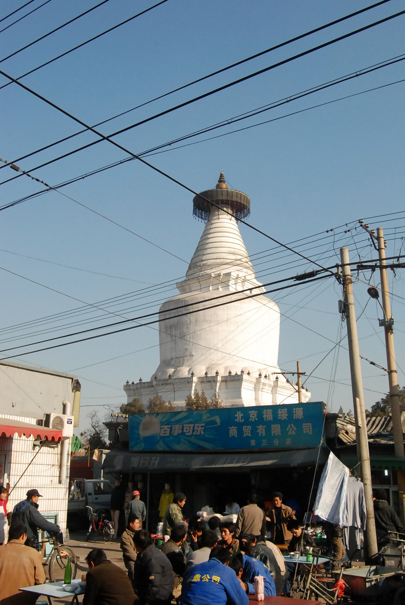 妙应寺白塔下的街市